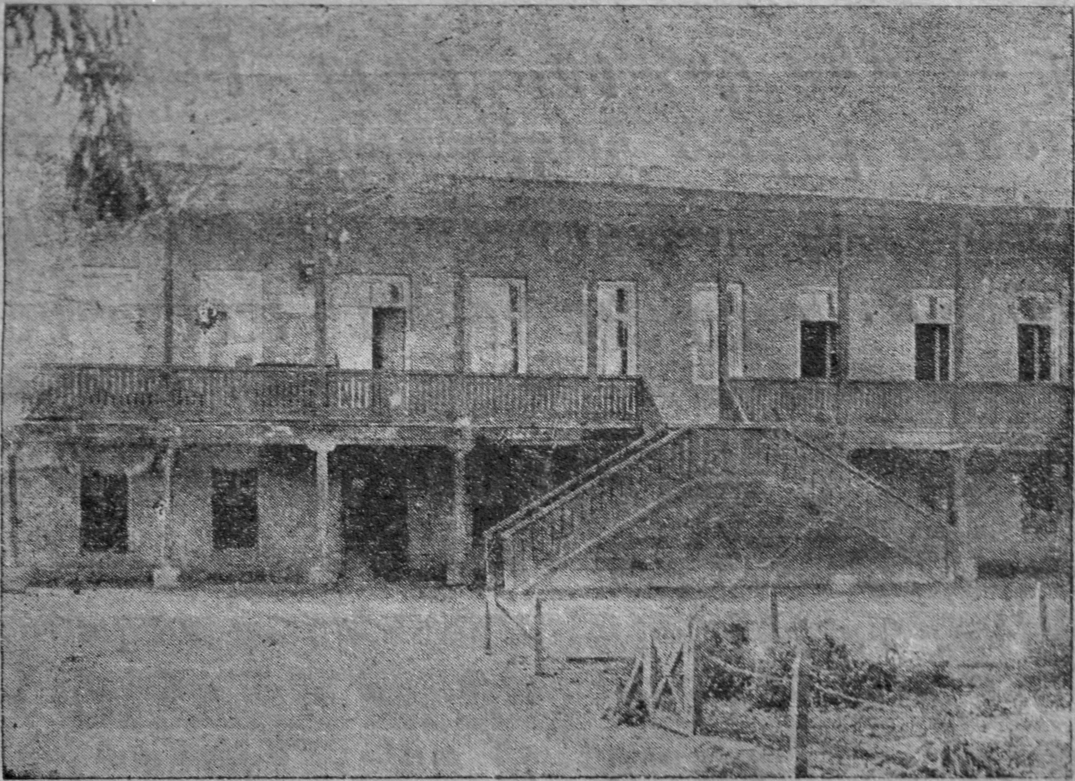 Սպարտակ երիտասարդական կազմակերպության տունը. վերատպված է՝ Ավանգարդ, № 19, 1924 (1)